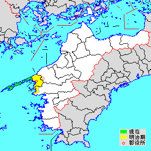 에히메현 니시우와군의 위치